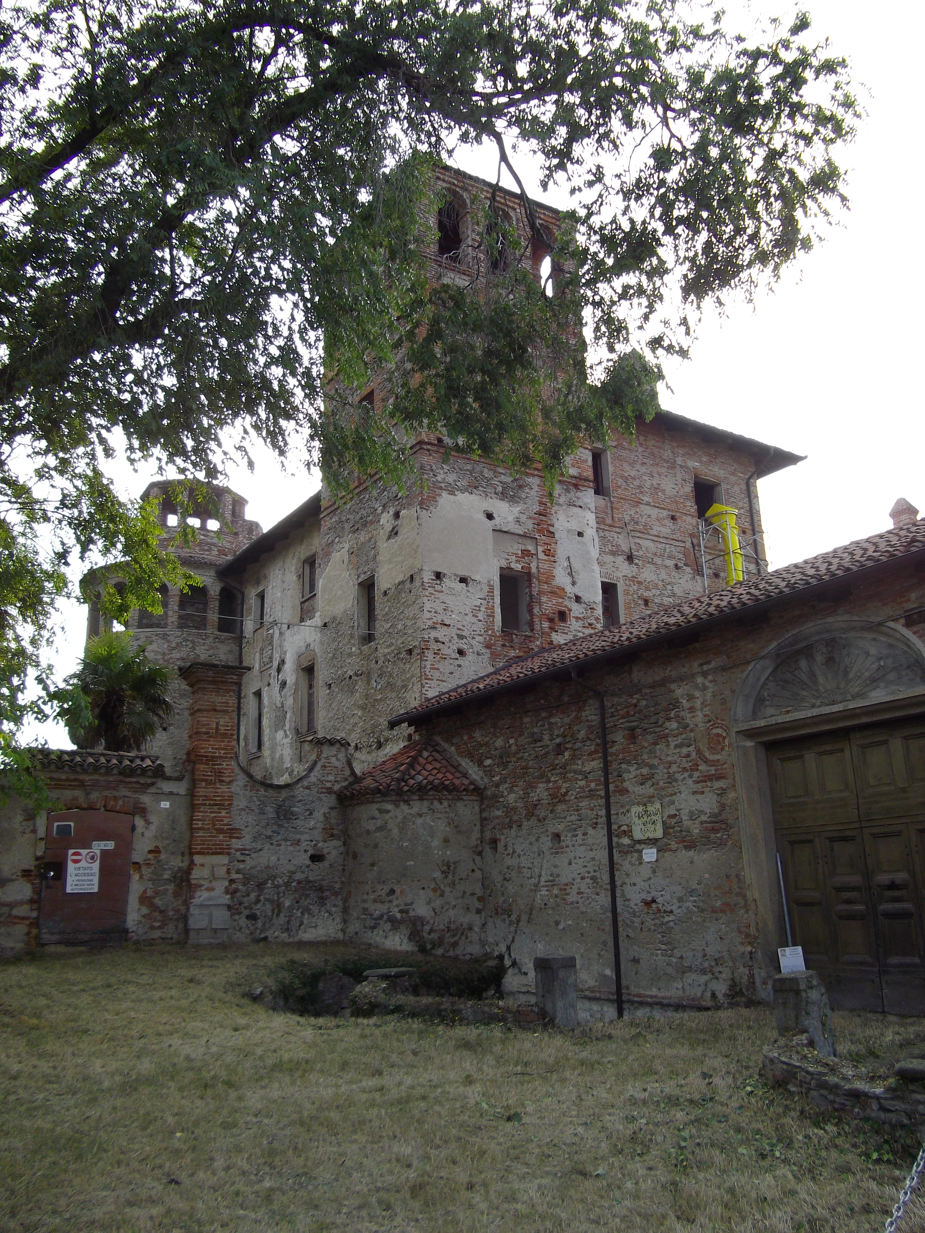 Piemontèis: 'L Castel 'd Costiòle - Castel dl'Amiralio